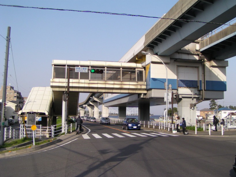 2005年4月17日に投稿者がja:野島公園駅で撮影。